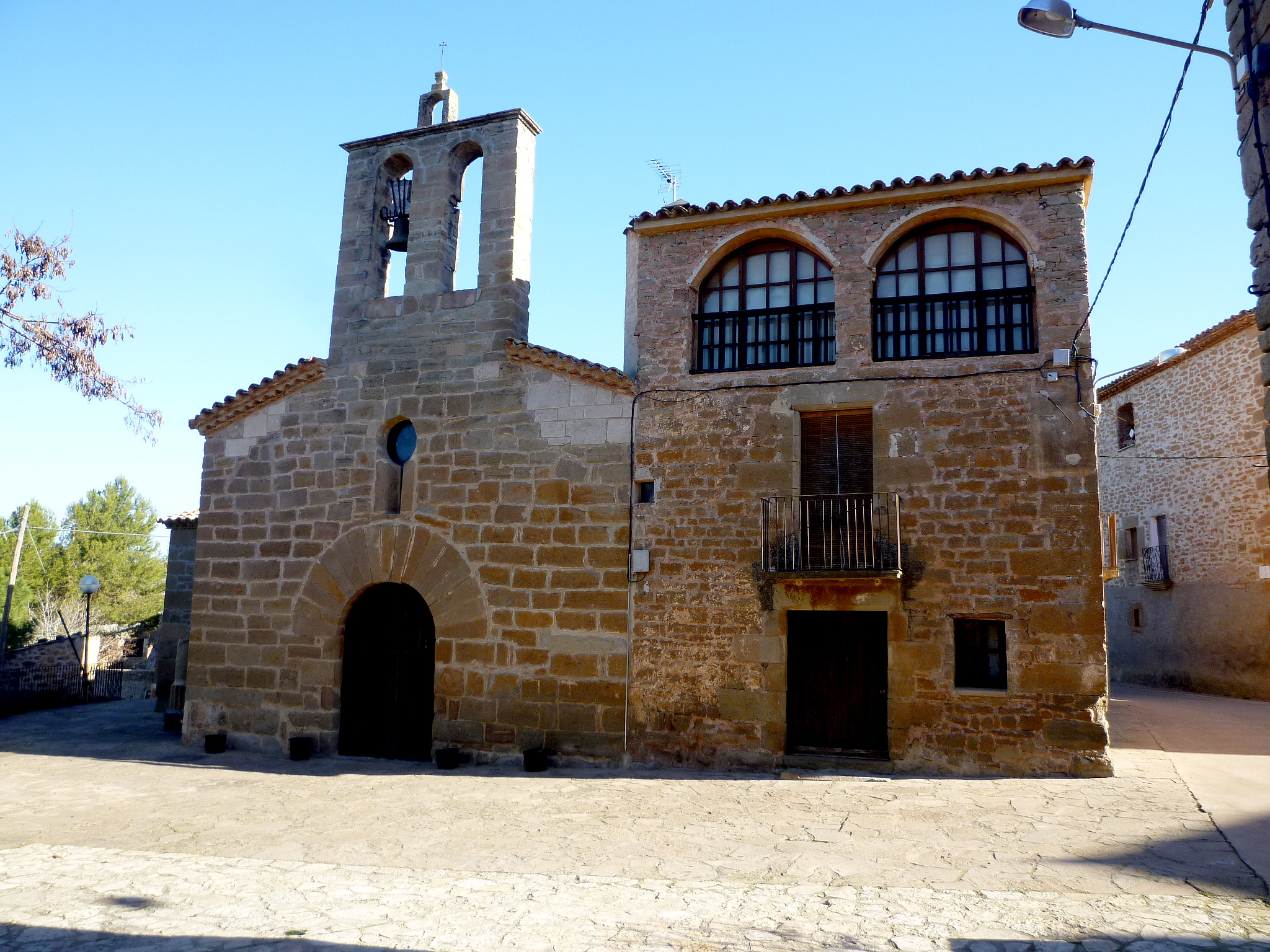 Església parroquial de Santa Maria d'Anya (Artesa de Segre), amb la rectoria